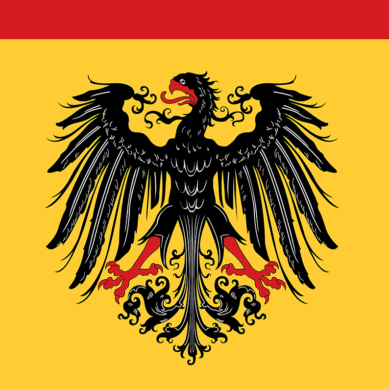 Reichssturmfahne mit rotem Wimpel